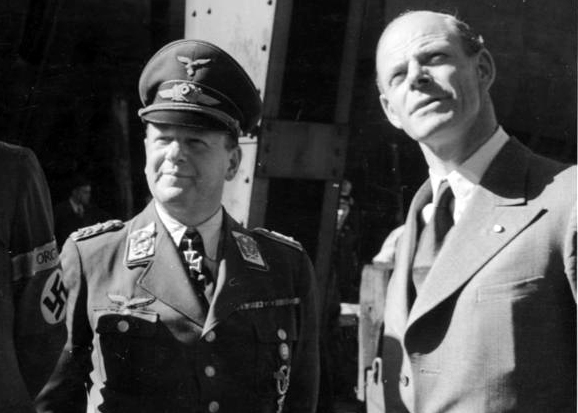 Factual corrections and alternative descriptions are encouraged separately from the original description. Additionally errors can be reported at this page to inform the Bundesarchiv. Original historic description: A. Speer, E. Milch, W. Messerschmitt ADN-Zentralbild/Archiv II. Weltkrieg, Inspektion eines Rüstungsbetriebes im Mai 1944 durch den Generalfeldmarschall Erhard Milch (links), rechts Prof. [Willy] Messerschmitt Abgebildete Personen: Messerschmitt, Willy Ing.: Flugzeugbauer, Firmengründer, Wehrwirtschaftsführer, Bundesrepublik Deutschland GND 118581376 Milch, Erhard: Generalfeldmarschall, Ritterkreuz (RK), Luftwaffe, Deutschland (GND 118582402)